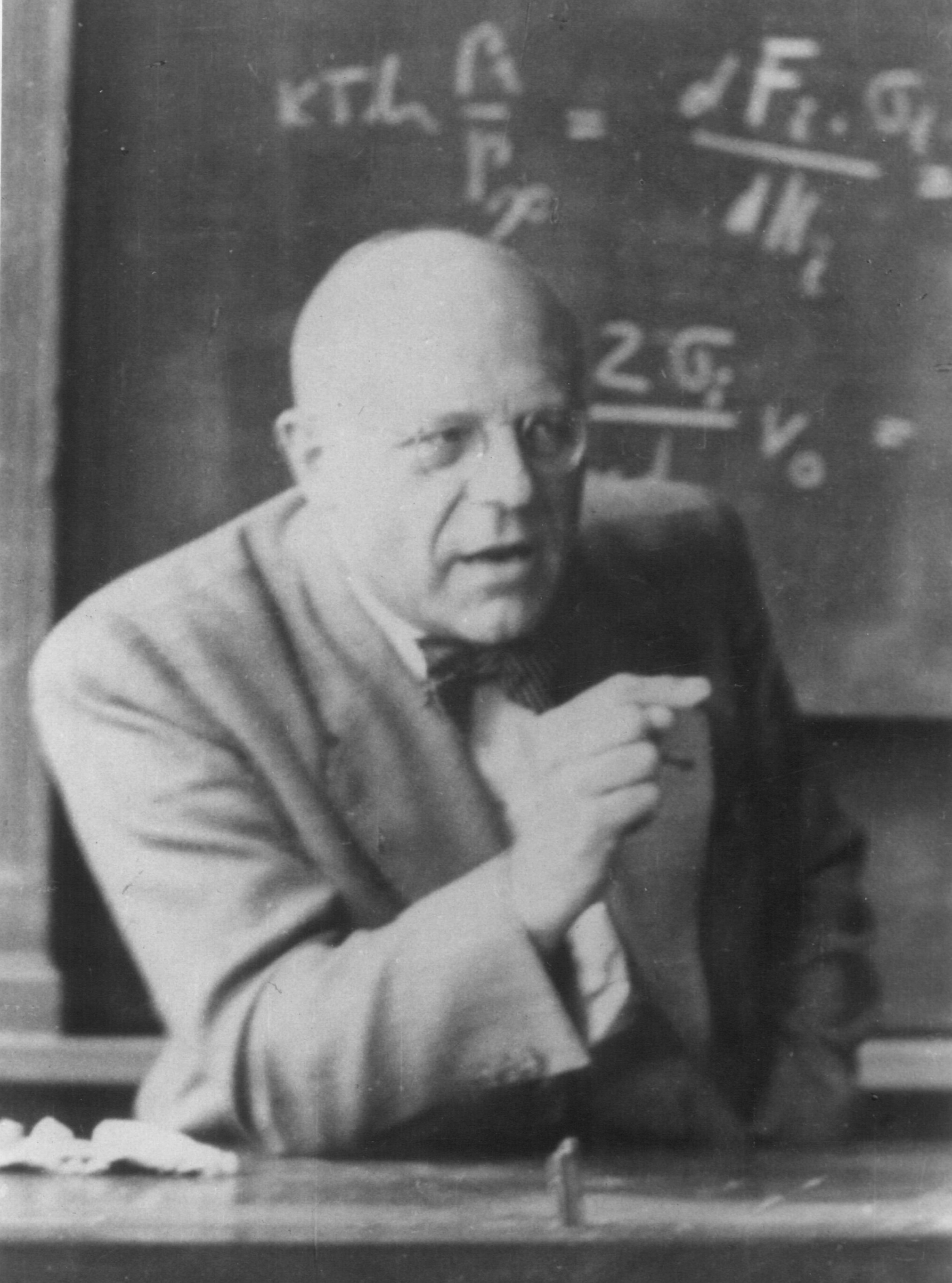 Iwan Stranski professor